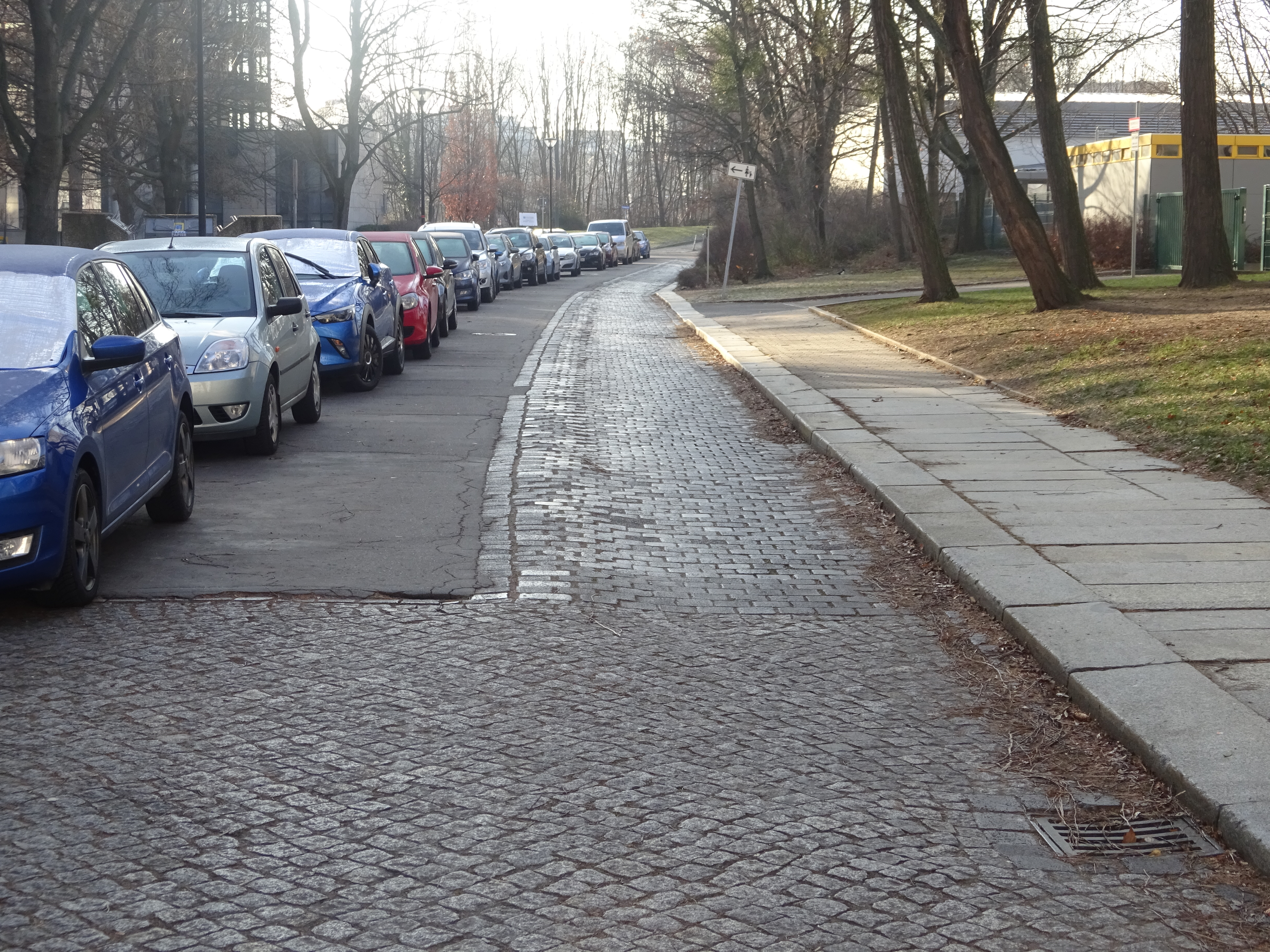 Ansicht der Großen Plauenschen Straße in Dresden